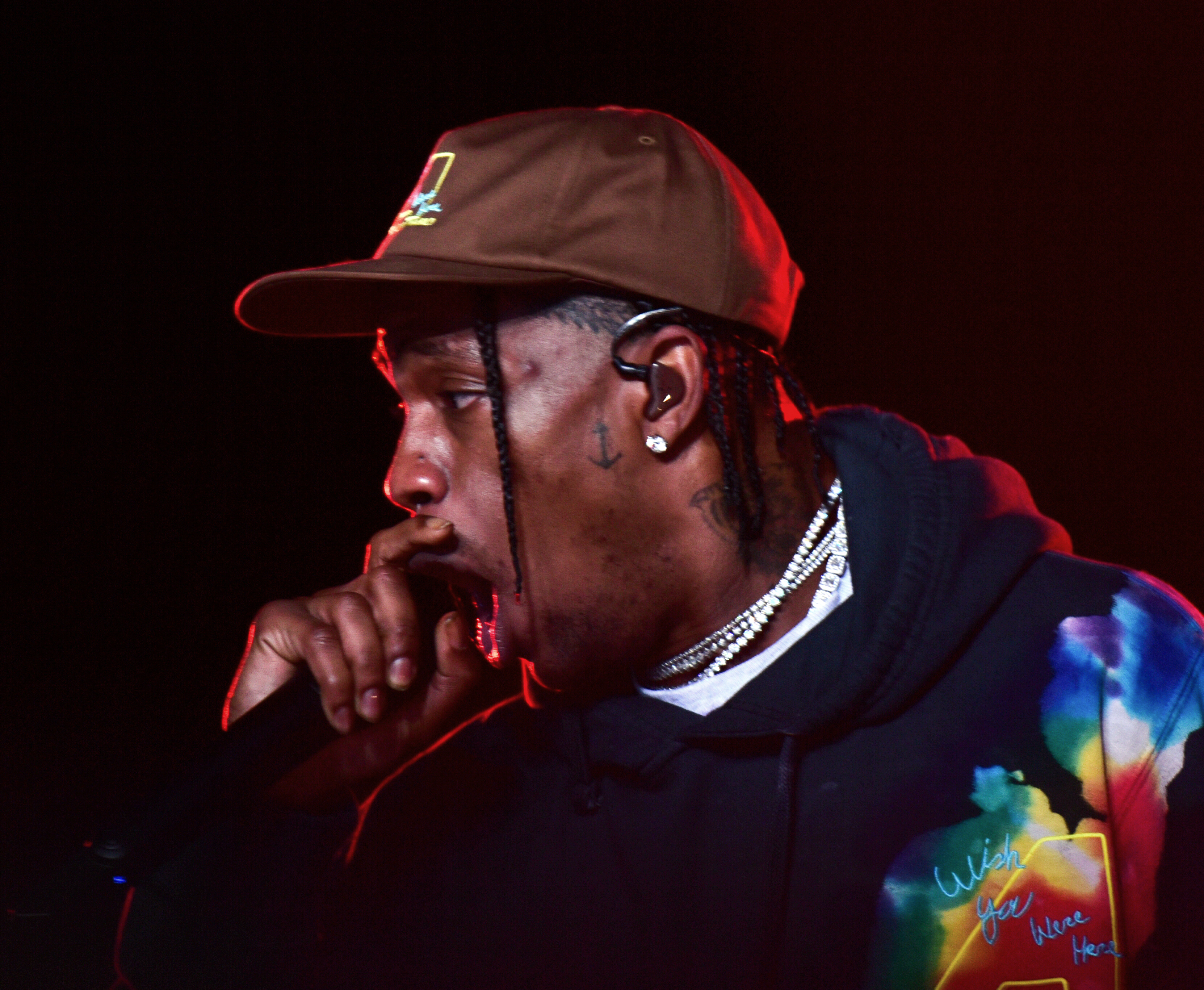 Travis Scott live auf dem Openair Frauenfeld 2019